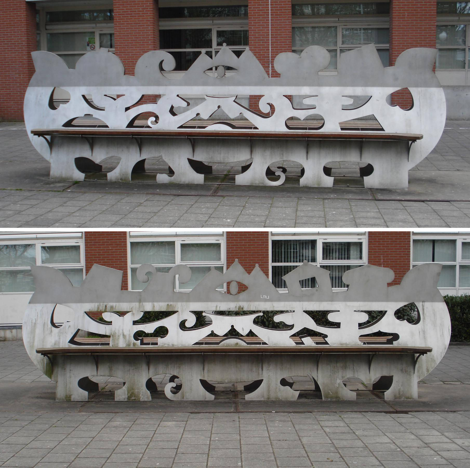 Spijkenisse, Sportlaan 13-15. Kunstwerk "Romeo en Julia" van Godelieve Smulders. The Netherlands. The photographical reproduction of this work is covered under the article 18 of the Dutch copyright law, which states that “it is not an infringement of copyright to reproduce and publish pictures of a work, as meant in article 10, first paragraph, under 6°[1] or of an architectural work as meant in article 10, first paragraph, under 8°[2], which are made to be permanently located in a public place, as long as the work is depicted as it is located in the public space. Where incorporation of a work in a compilation is concerned, not more than a few of the works of the same author may be included”. [1] drawings, paintings, works of architecture and sculpture, lithographs, engravings and the likes [2] drafts, sketches and three-dimensional works relating to architecture, geography, topography or other sciences Note that photographs are not included in Item 6. They are separately listed at Item 9 and are therefore not covered by FOP. See COM:CRT/Netherlands#Freedom of panorama for more information. .